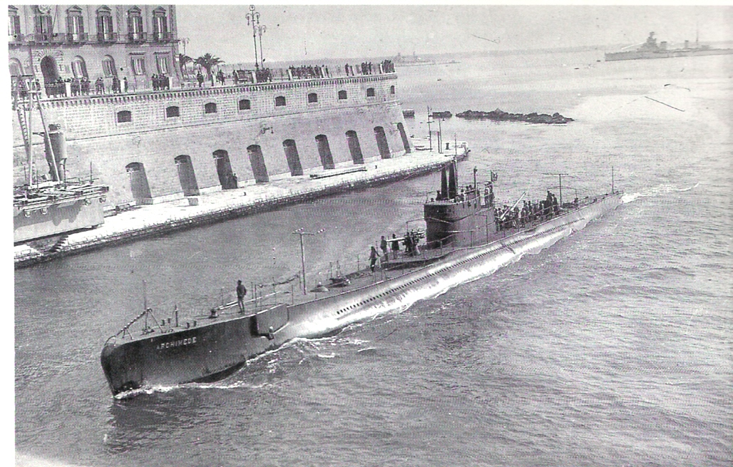 Il sommergibile Archimedi I a Taranto